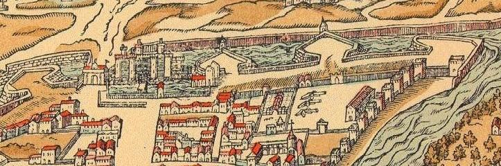 Plan de Paris, la marque en rouge indique le site du Clos du Chardonnet